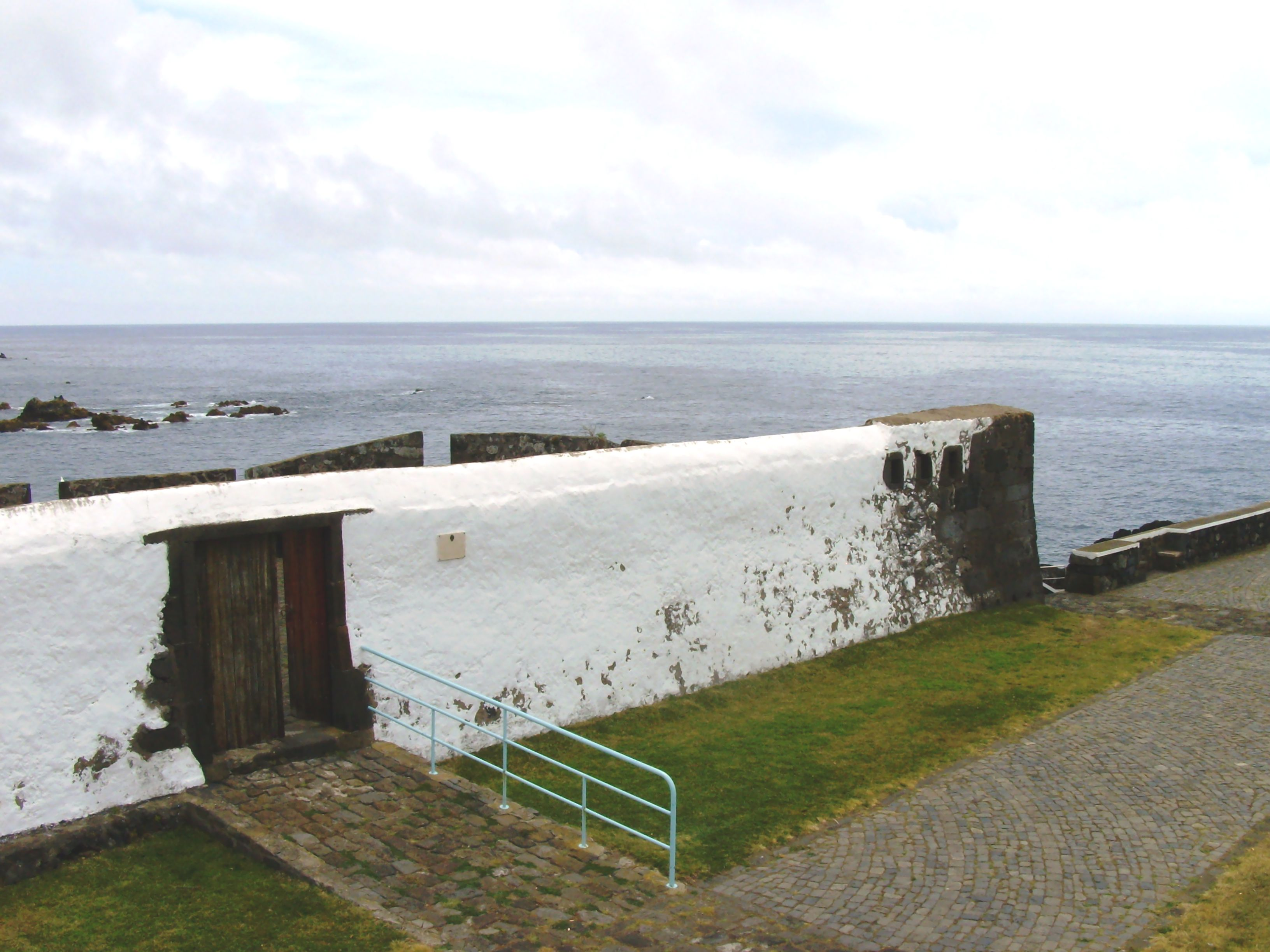 Forte do Negrito, São Mateus da Calheta, Angra do Heroísmo, Ilha Terceira, Açores: portão de armas.